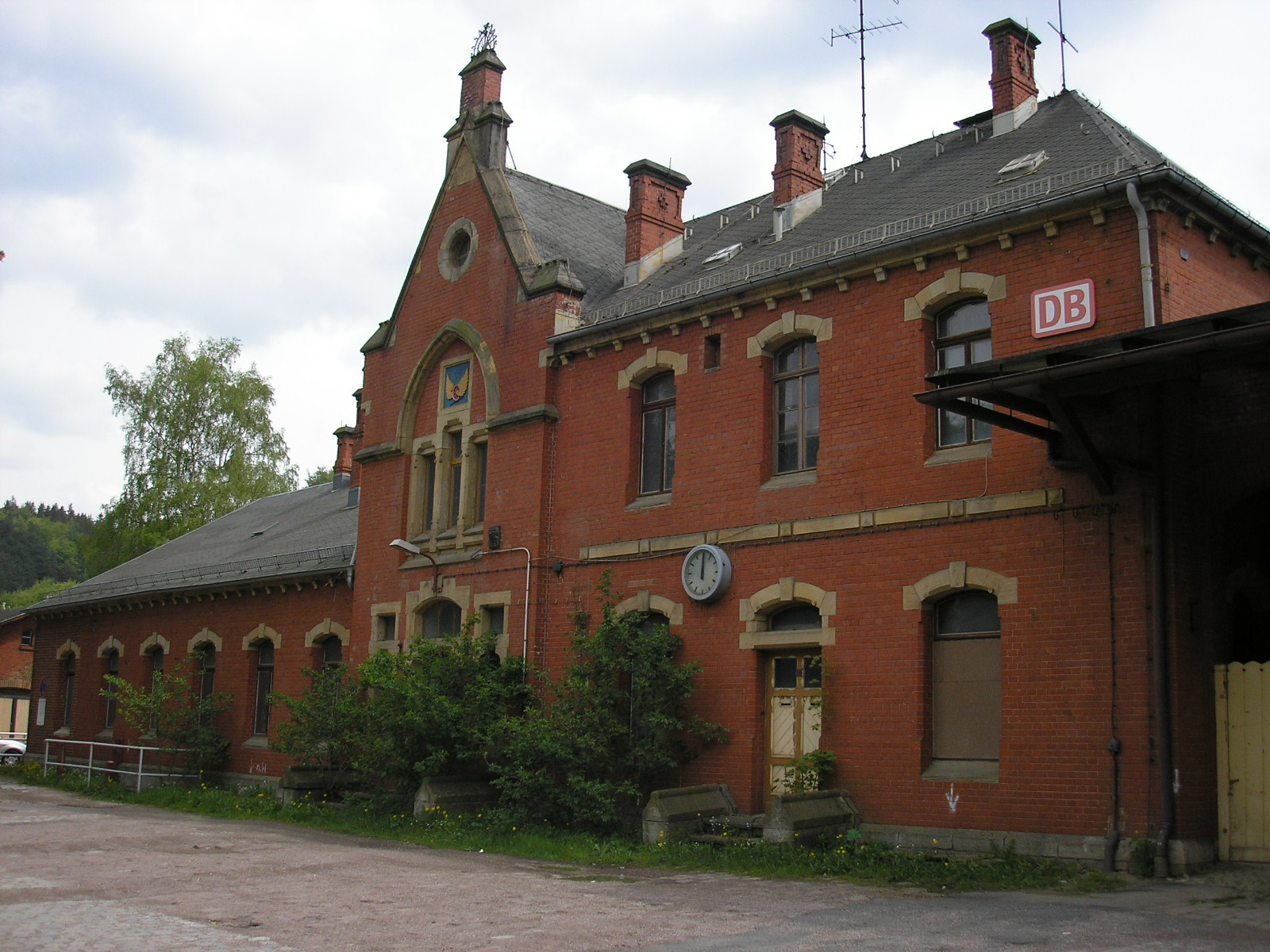 Bahnhof von Gräfenroda (Thüringen).